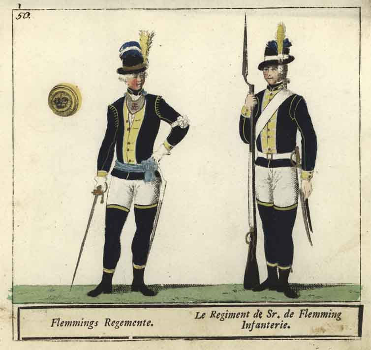 Flemings regemente uniform m/1779, ur C. G. Roos samling.